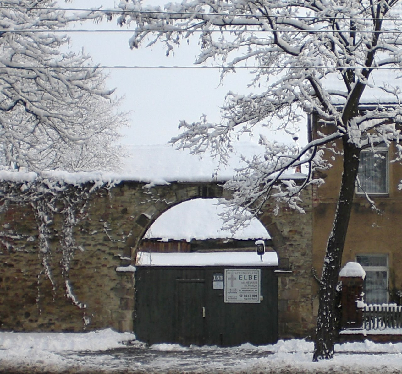 Nördliches Tor des weibezahlschen Hofs in Magdeburg-Westerhüsen